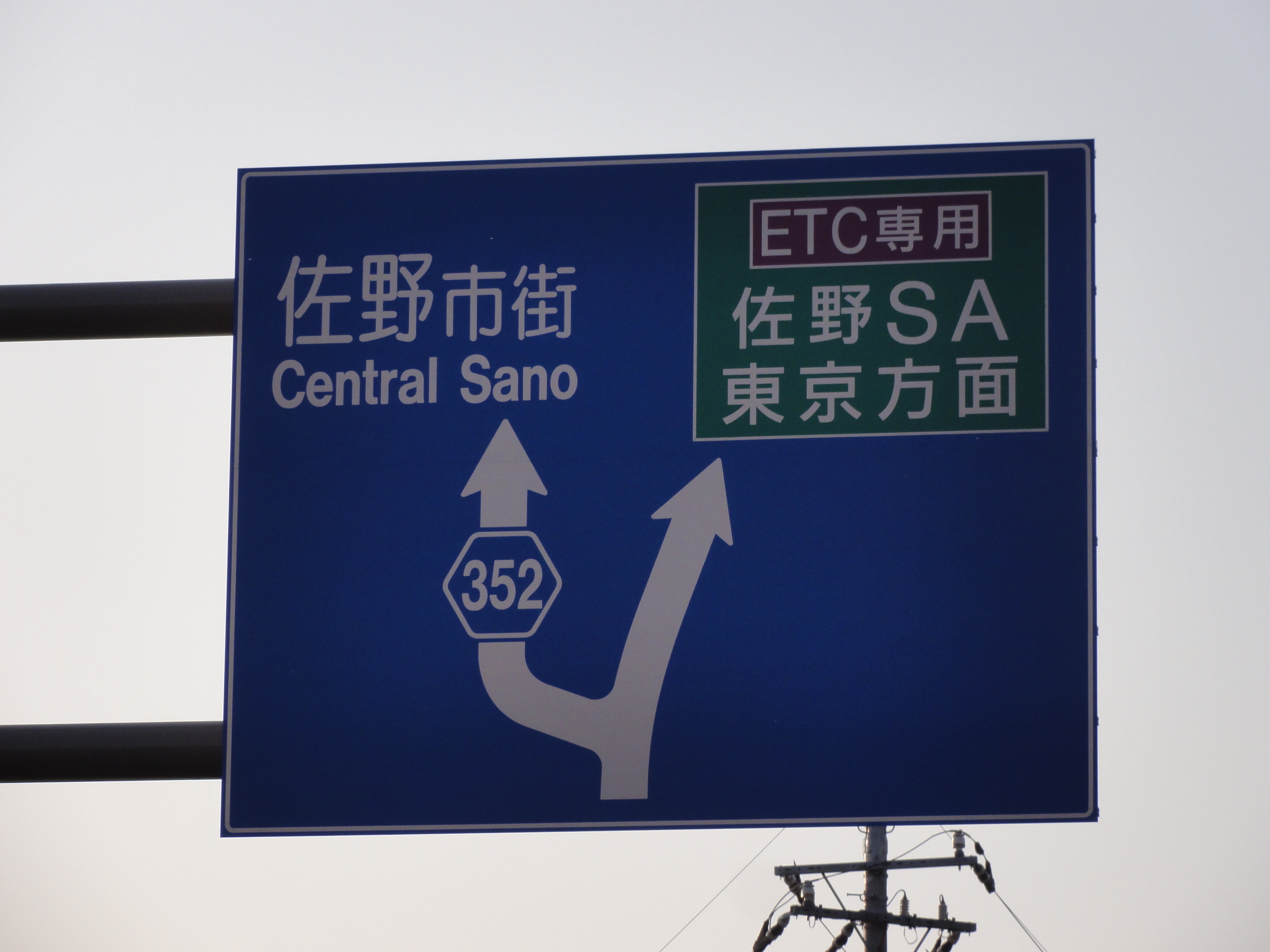 栃木県道352号 佐野SAインターチェンジ線